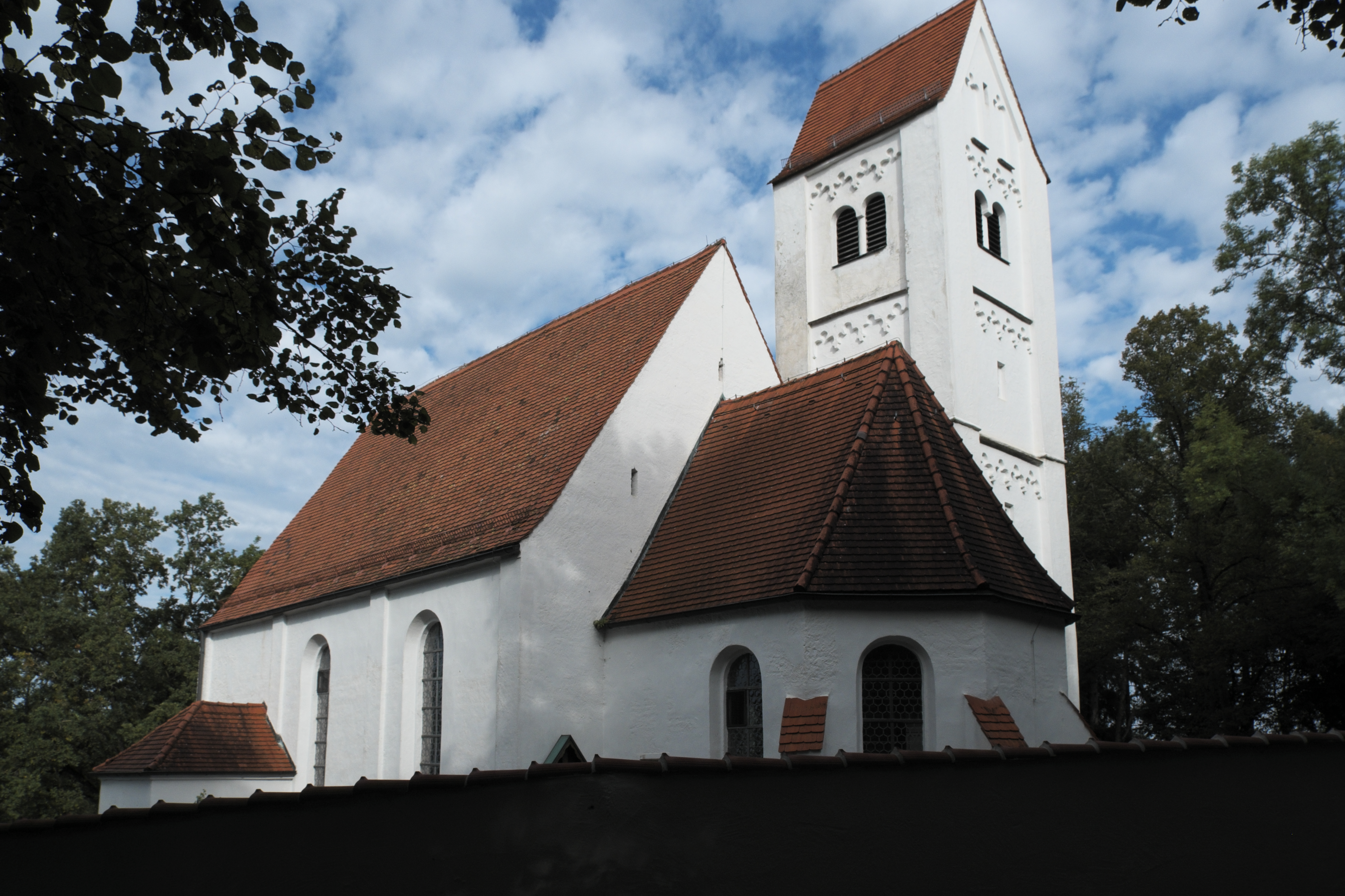 Katholische Filialkirche St. Michael, heute Friedhofskirche, in Waalhaupten (Waal) im Landkreis Ostallgäu (Bayern/Deutschland)